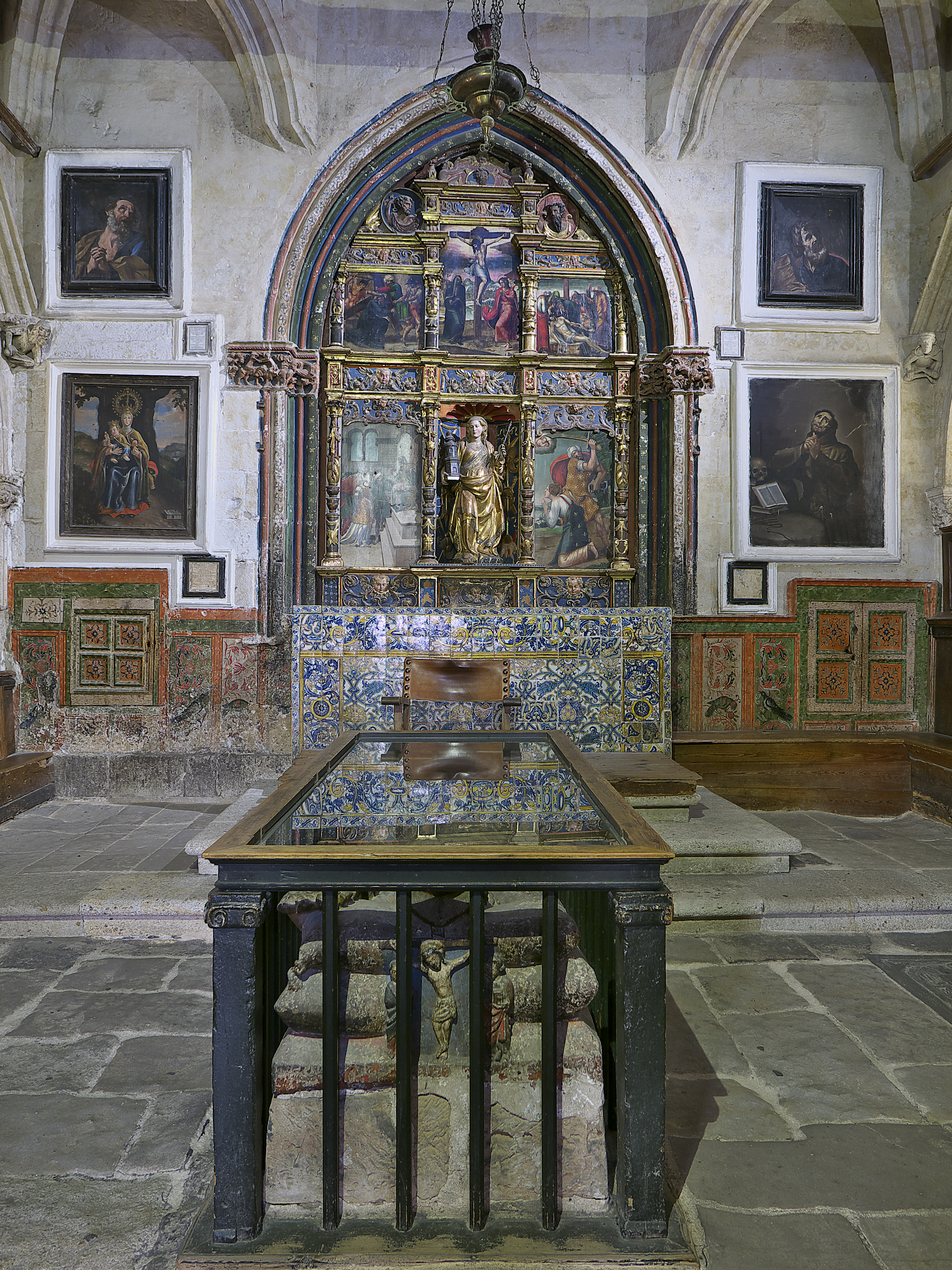 Claustro de la Catedral Vieja de Salamanca. Capilla funeraria fundada (1334) por el obispo Juan Lucero (†1362).